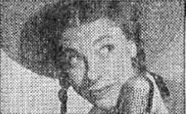 Judy Canova